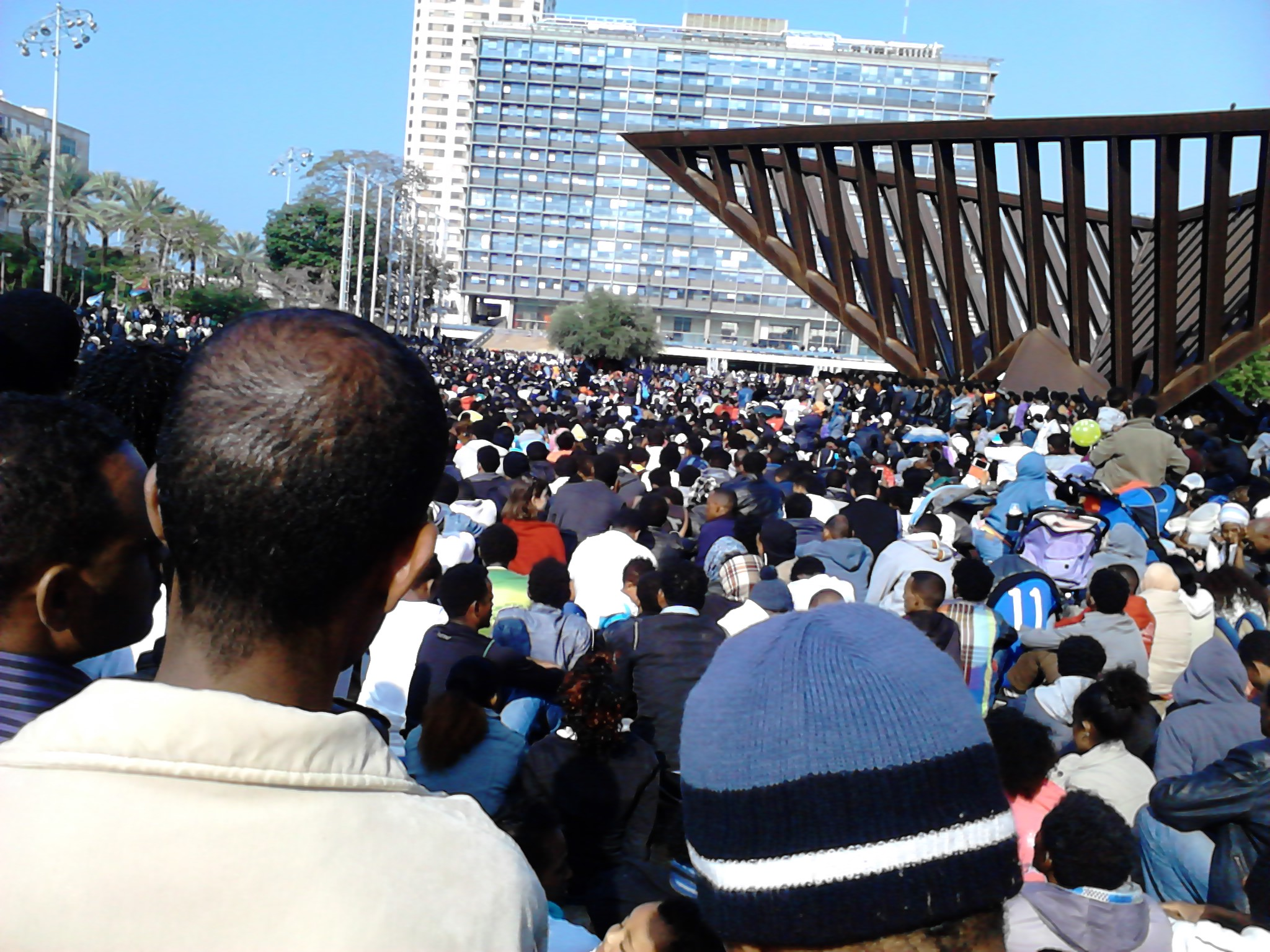 הפגנת מסתננים אפריקאים בתל-אביב